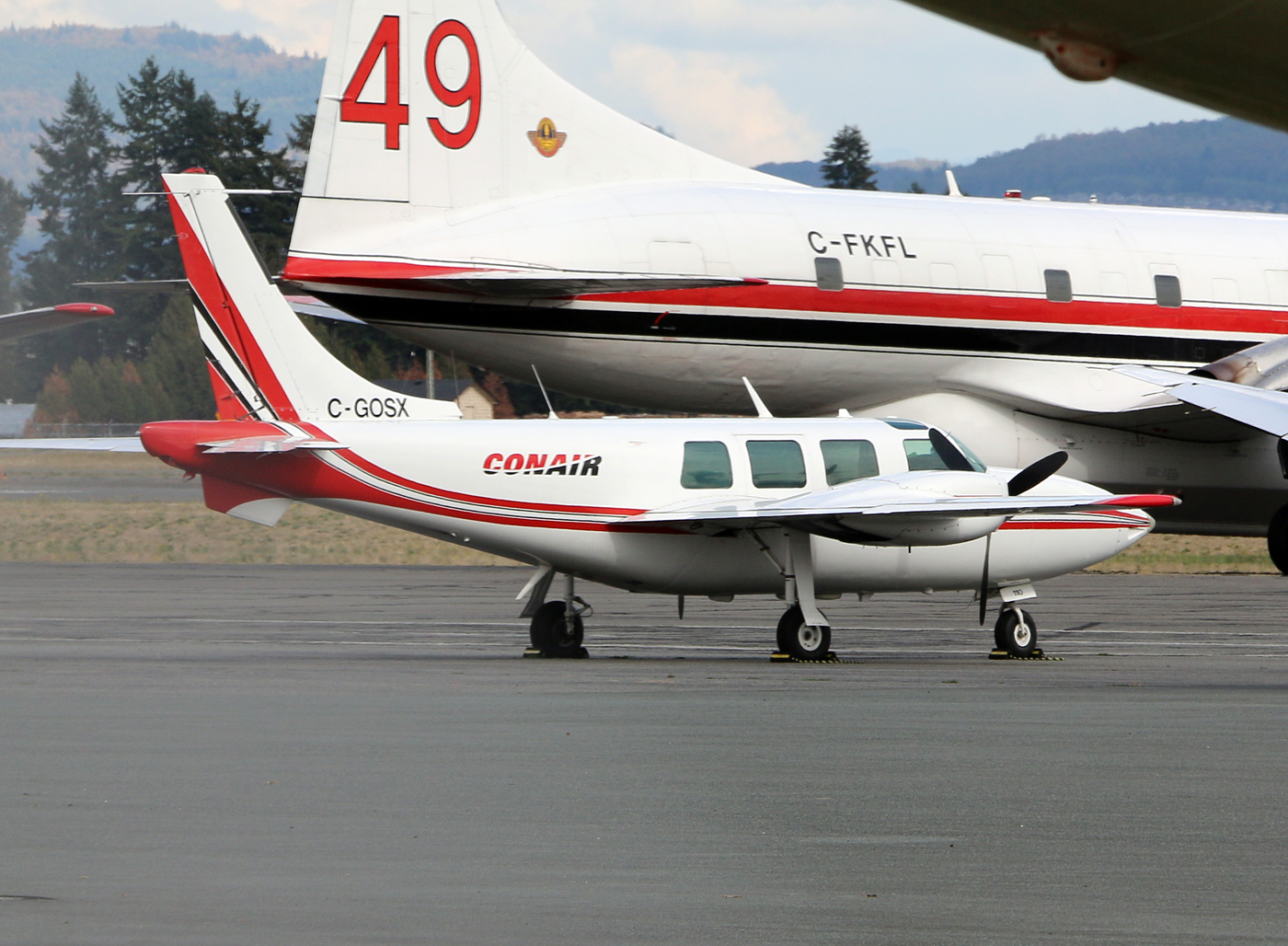 Abbotsford 15 Sep 2015